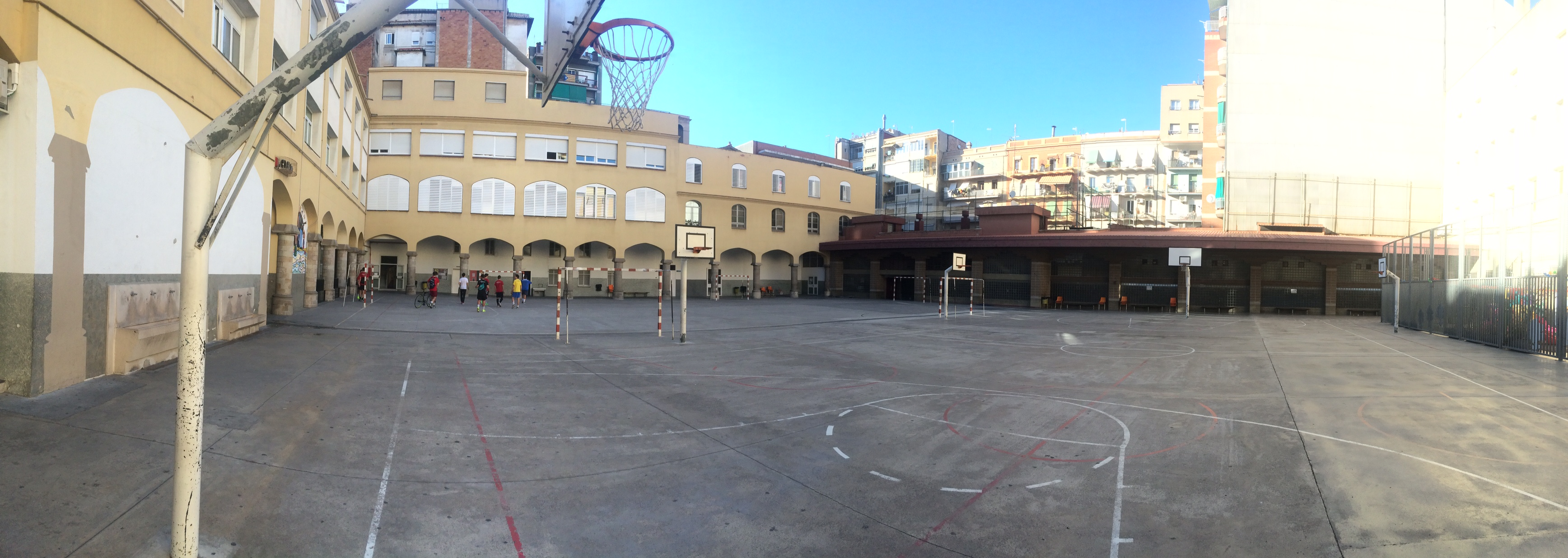 Fotografia que mostra els dos patis de l'escola, el de bàsquet i el de futbol sala.